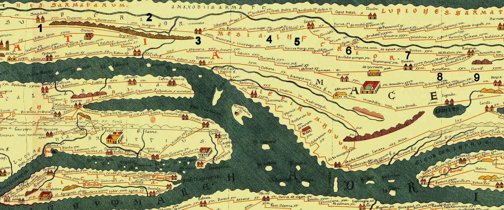 Deo Tabule Peutingeriane sa rimskim putevima preko teritorije današnje Srbije Brojevima je označen deo od 40 stanica na ovom prostoru. Za izradu slike korišćena je ova sa ostave.